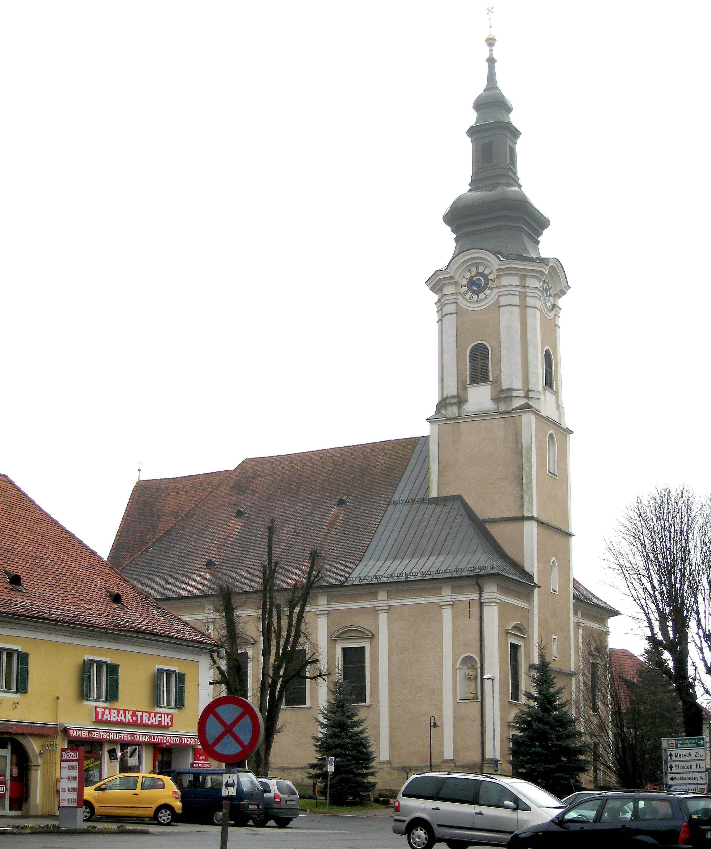 Kath. Pfarrkirche hl. Maria